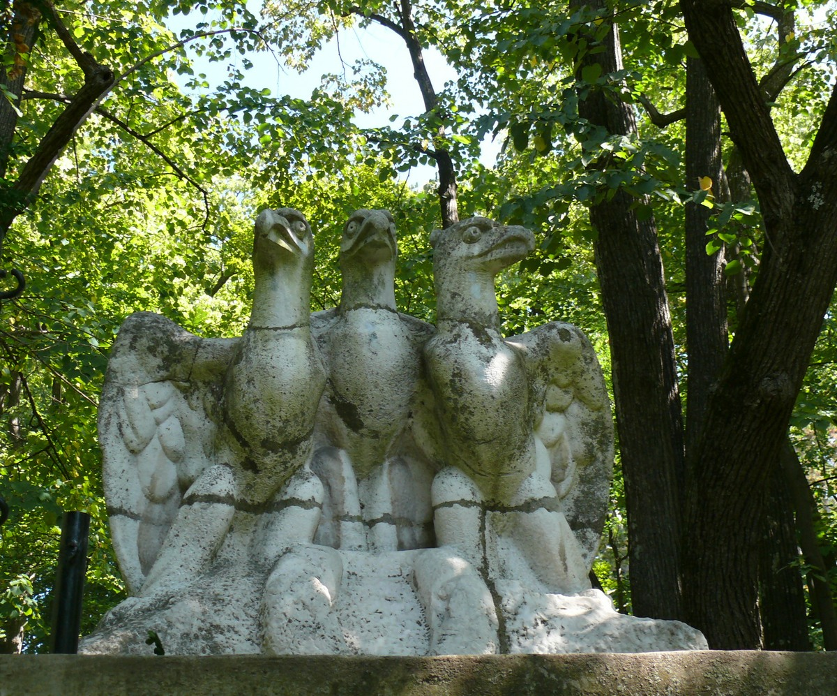 Ansamblul conacului Brătianu - "Florica"